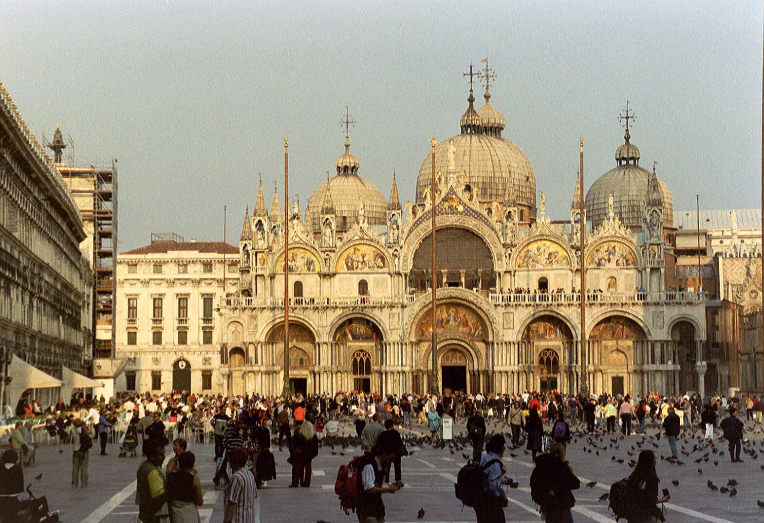 Venice, Basilica di San Marco